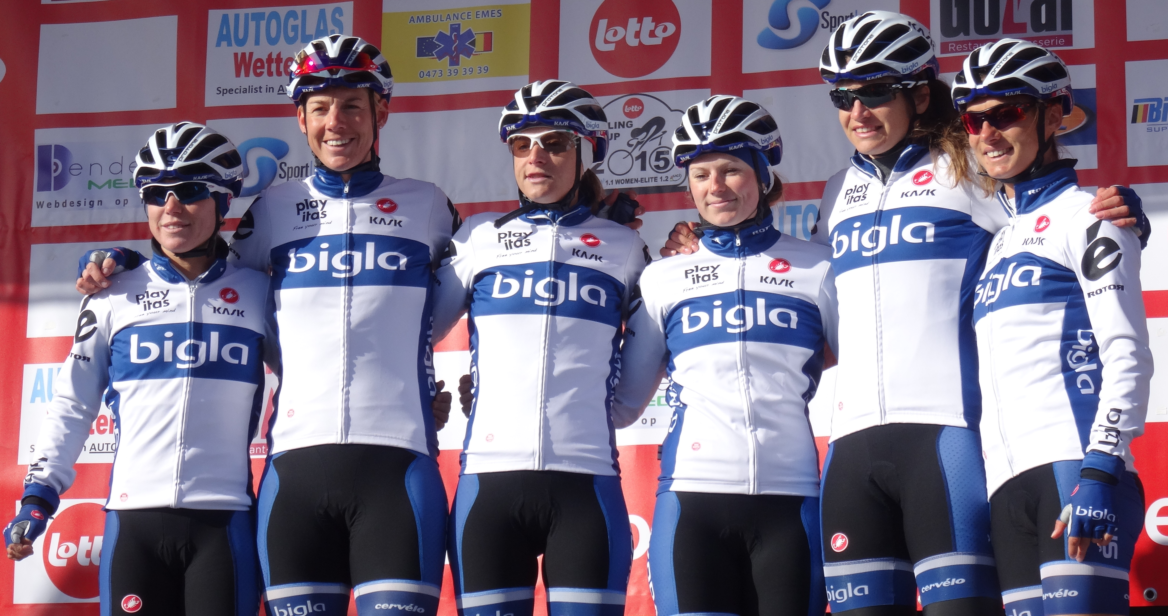 Reportage réalisé le mercredi 4 mars à l'occasion du départ du Samyn des Dames 2015 et du Samyn 2015 à Quaregnon, Belgique.